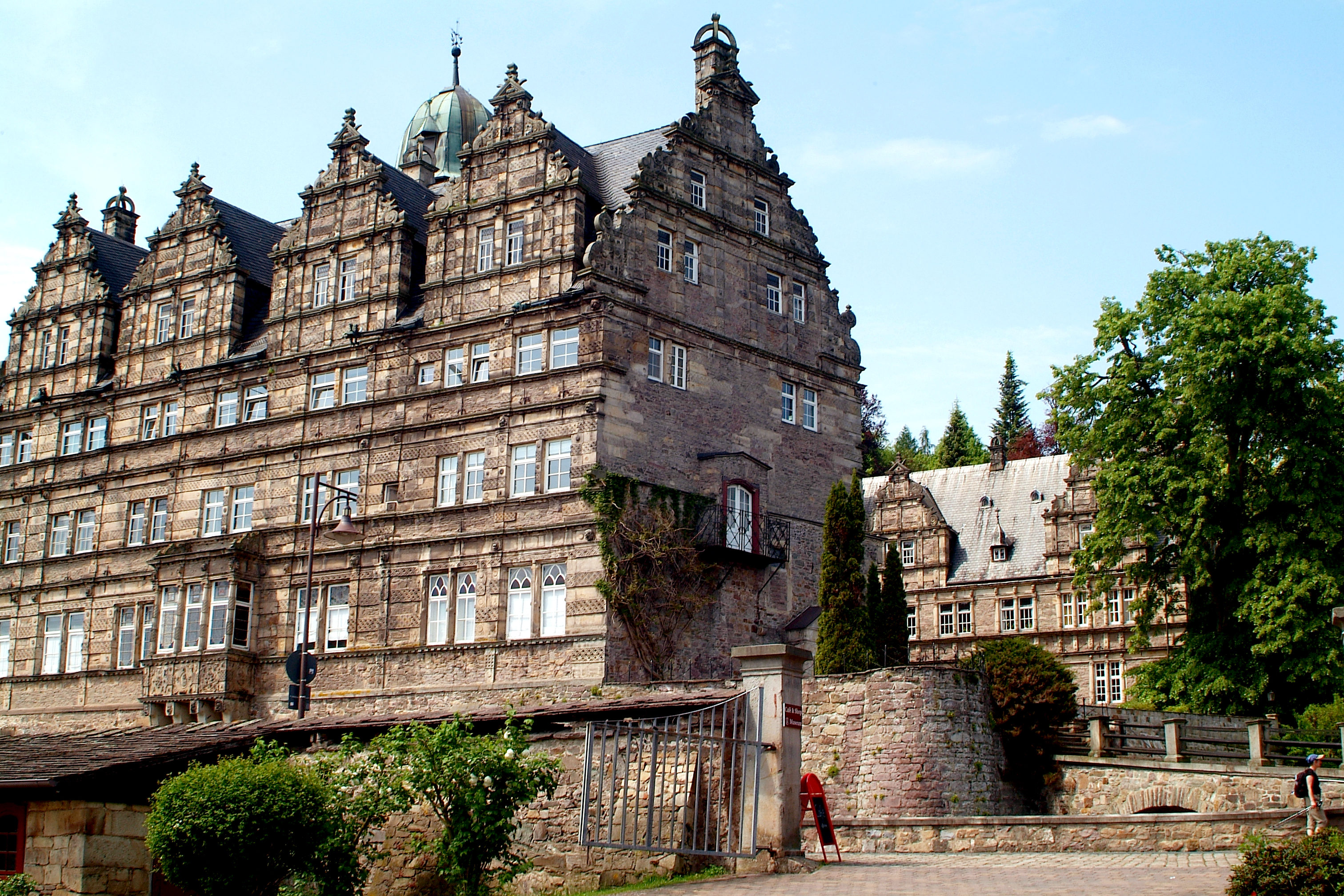 Auswahl von Ansichten aus Emmerthal-Hämelschenburg, die Ortschaft rund um Schloss Hämelschenburg mit ihren jahrhundertealten Geschichten bis in die Gegenwart.